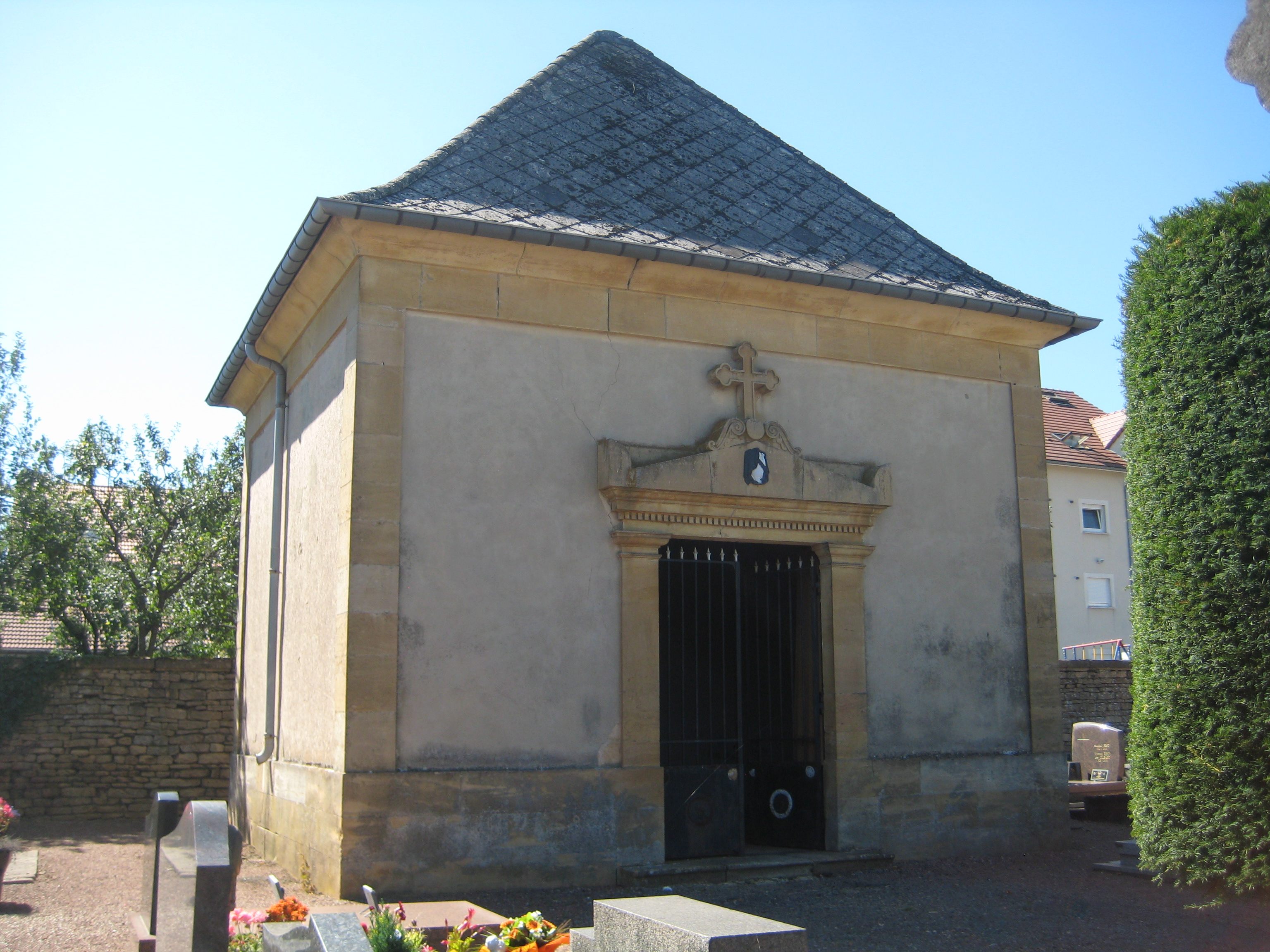 Description Chapelle du cimetière Aumetz Chapelle du cimetière Aumetz